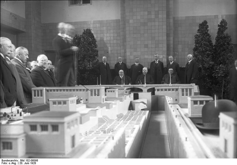 Die Einweihung der größten Binnenschleuse Europas in Anderten b./Hannover fand am 20. Juni durch den Reichspräsidenten von Hindenburg statt. Der Reichspräsident von Hindenburg am Modell der größten Binnenschleuse Europas , während der Eröffnungsfeierlichkeiten. Neben ihm links im Bilde der Oberpräsident von Hannover, Noske.